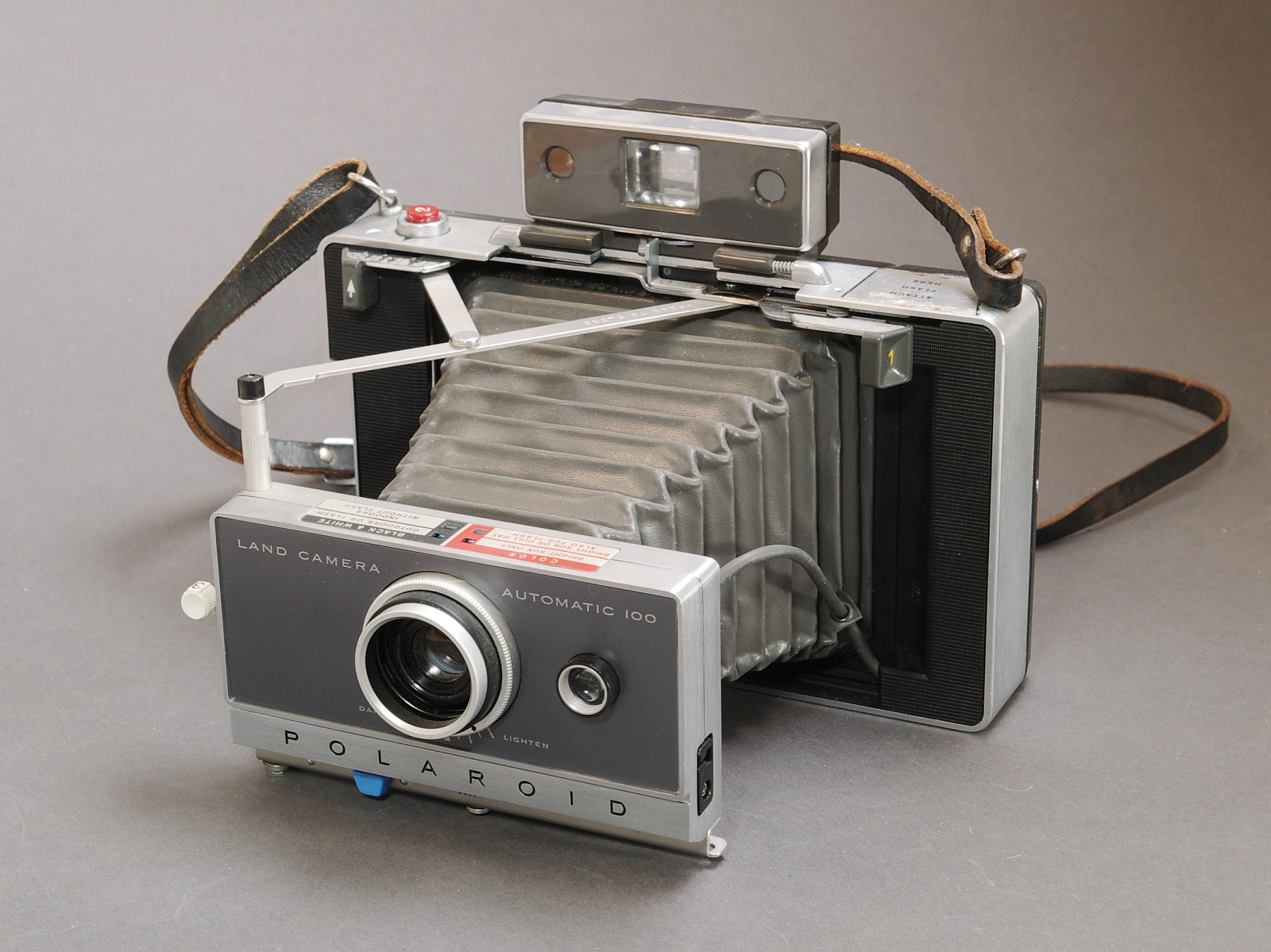 Polaroid Land Camera Automatic 100